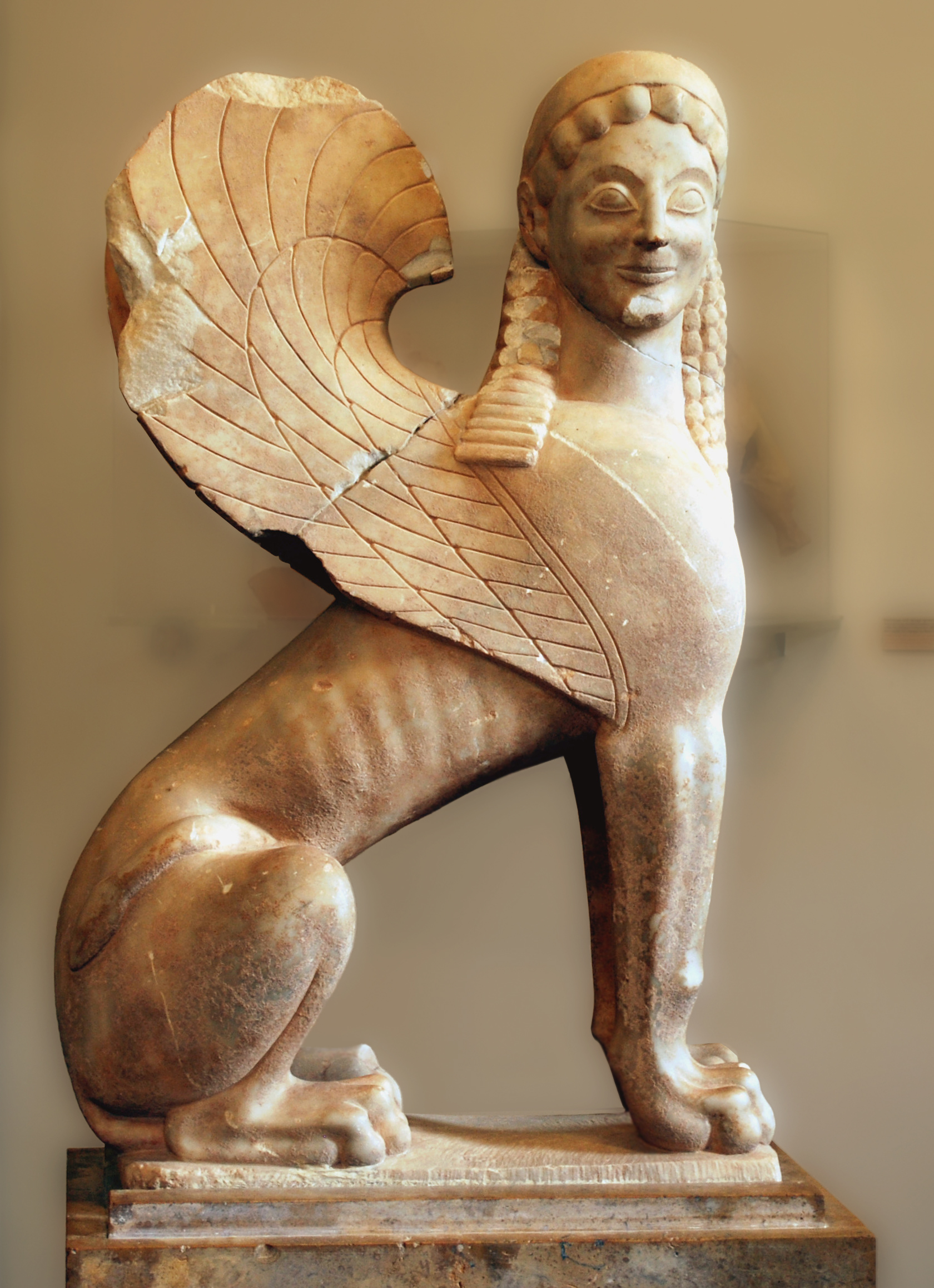 Sphynx en calcaire (époque archaïque).